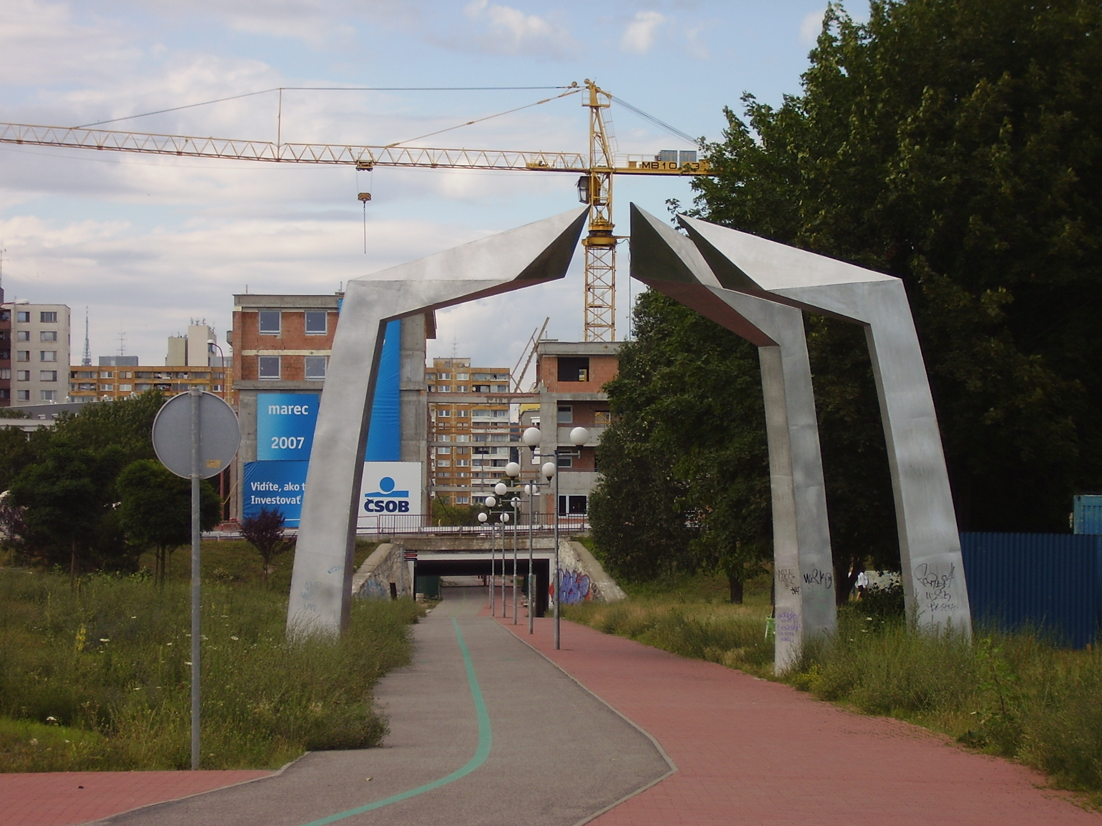 Bratislava